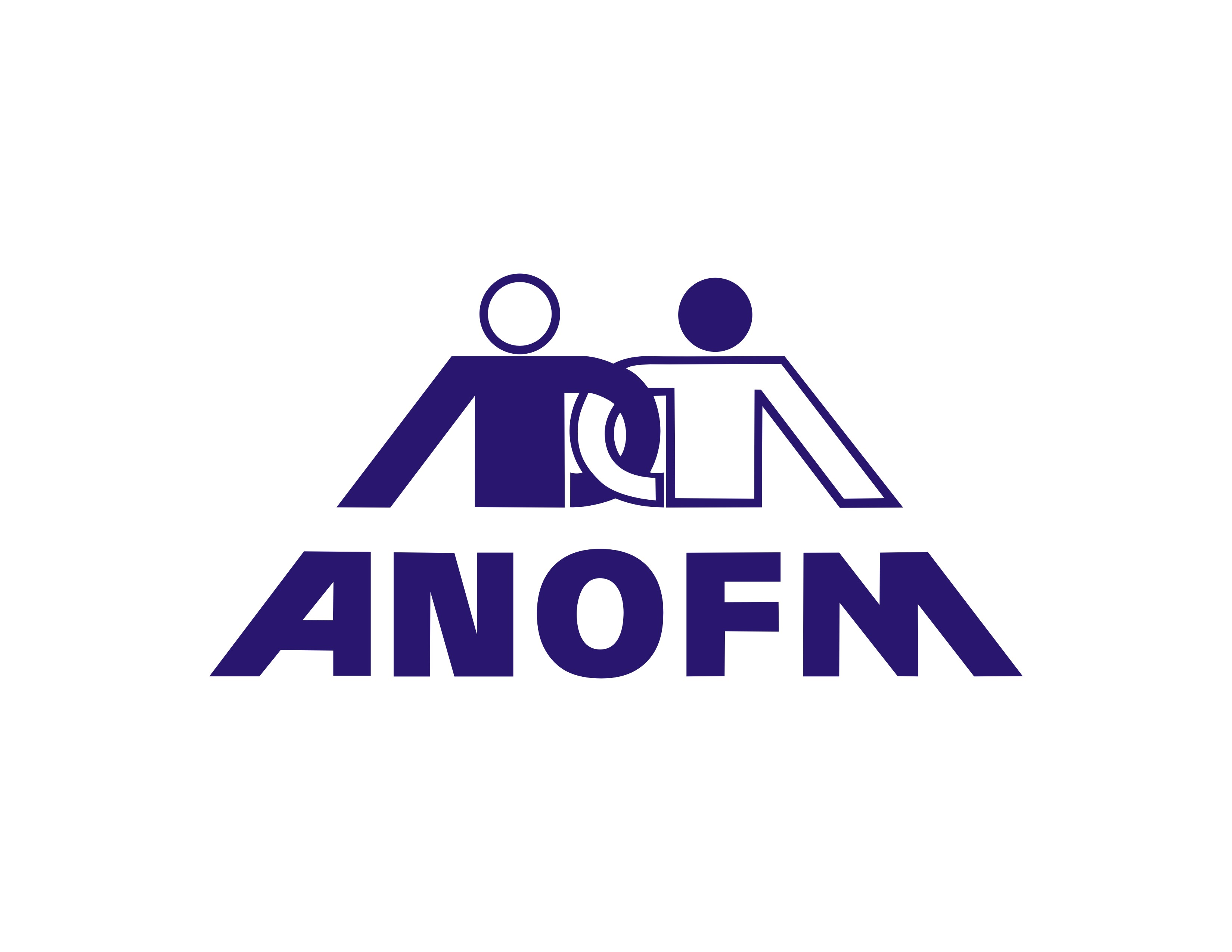 Sigla ANOFM